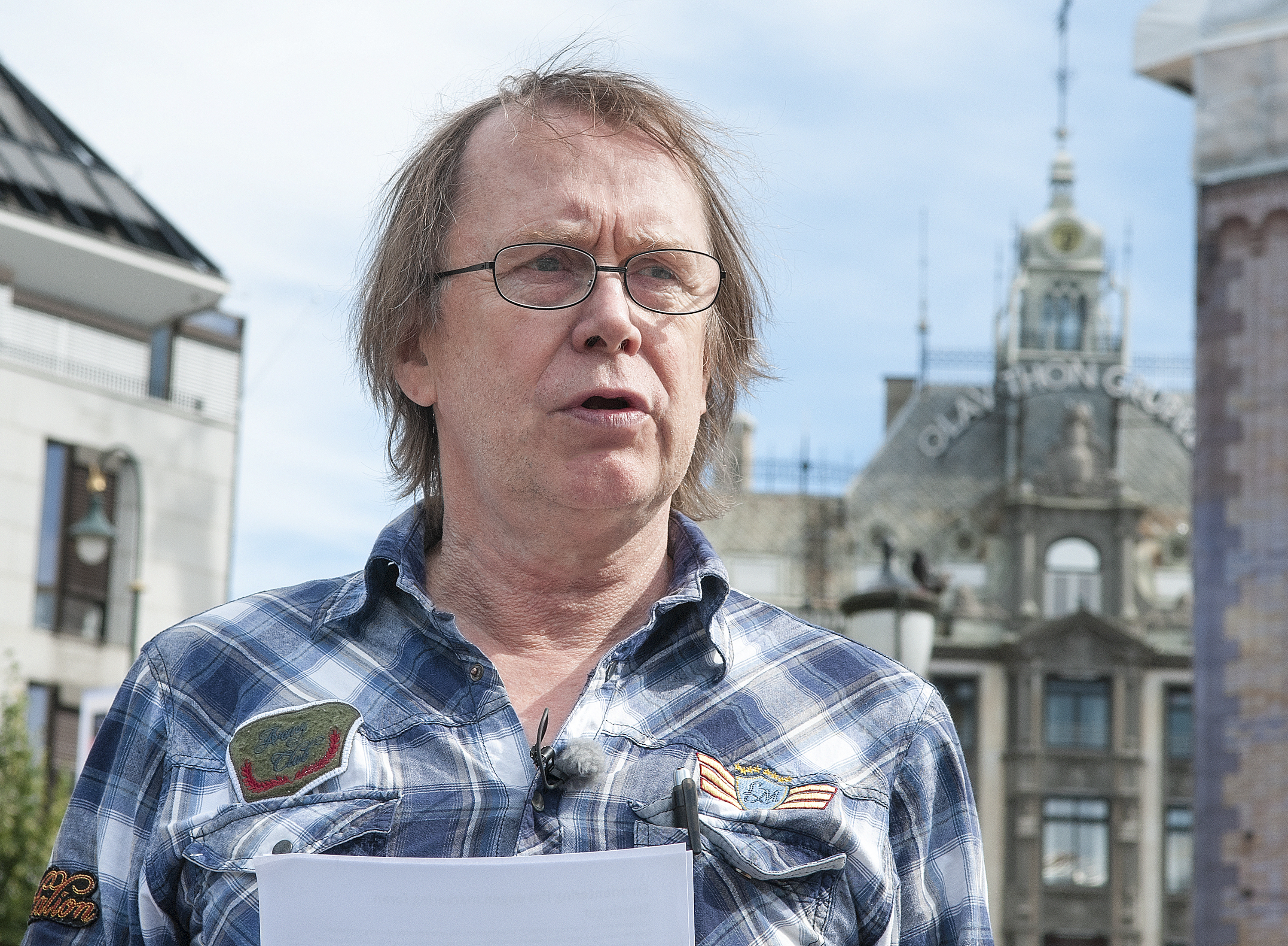 Øystein Meier Johannessen - Aksjon på Eidsvoll Plass foran Stortinget 21 August 2013 motoljeboring utenfor Lofoten, Vesterålen og Senja.